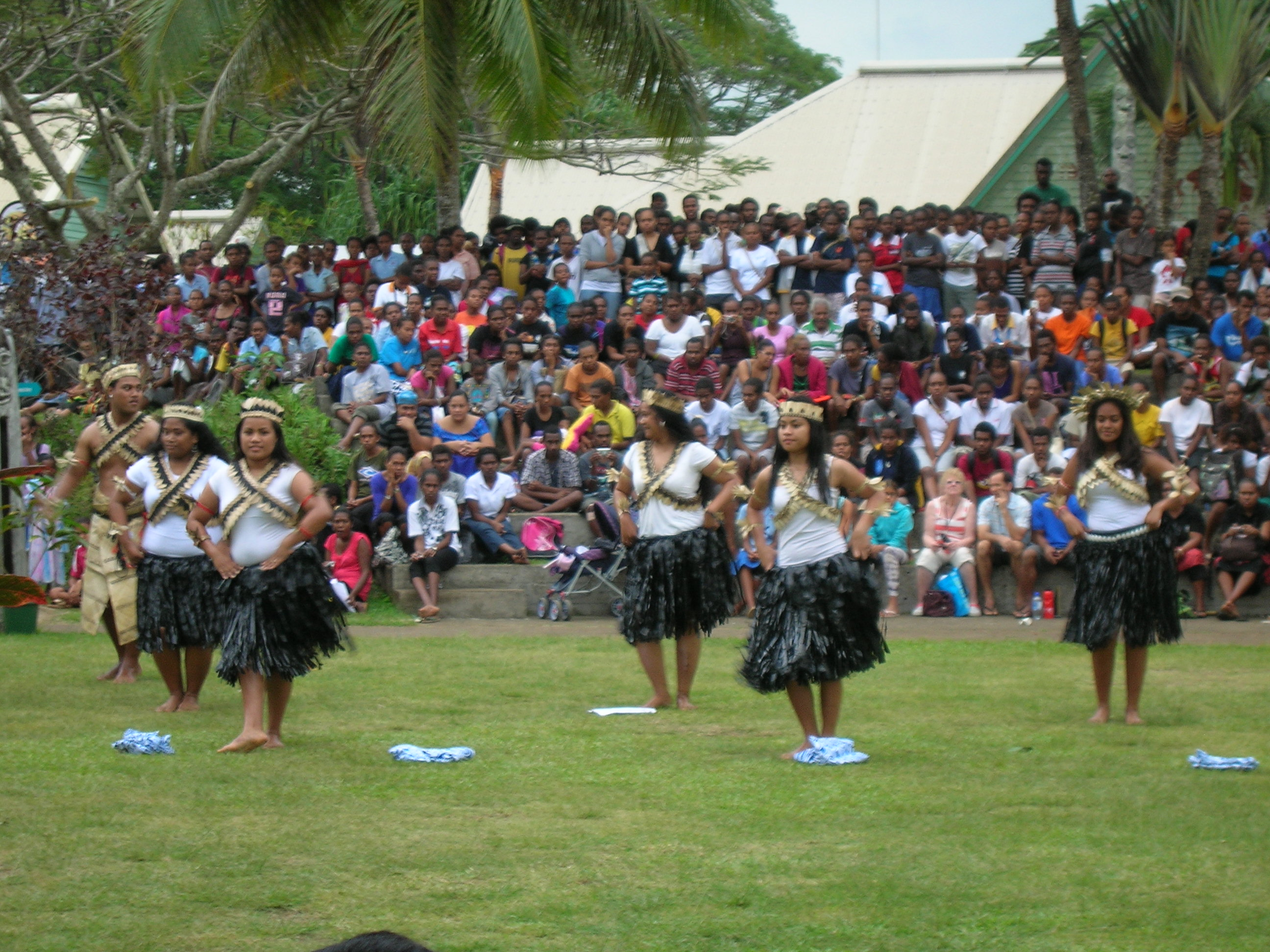 Kiribati dancers